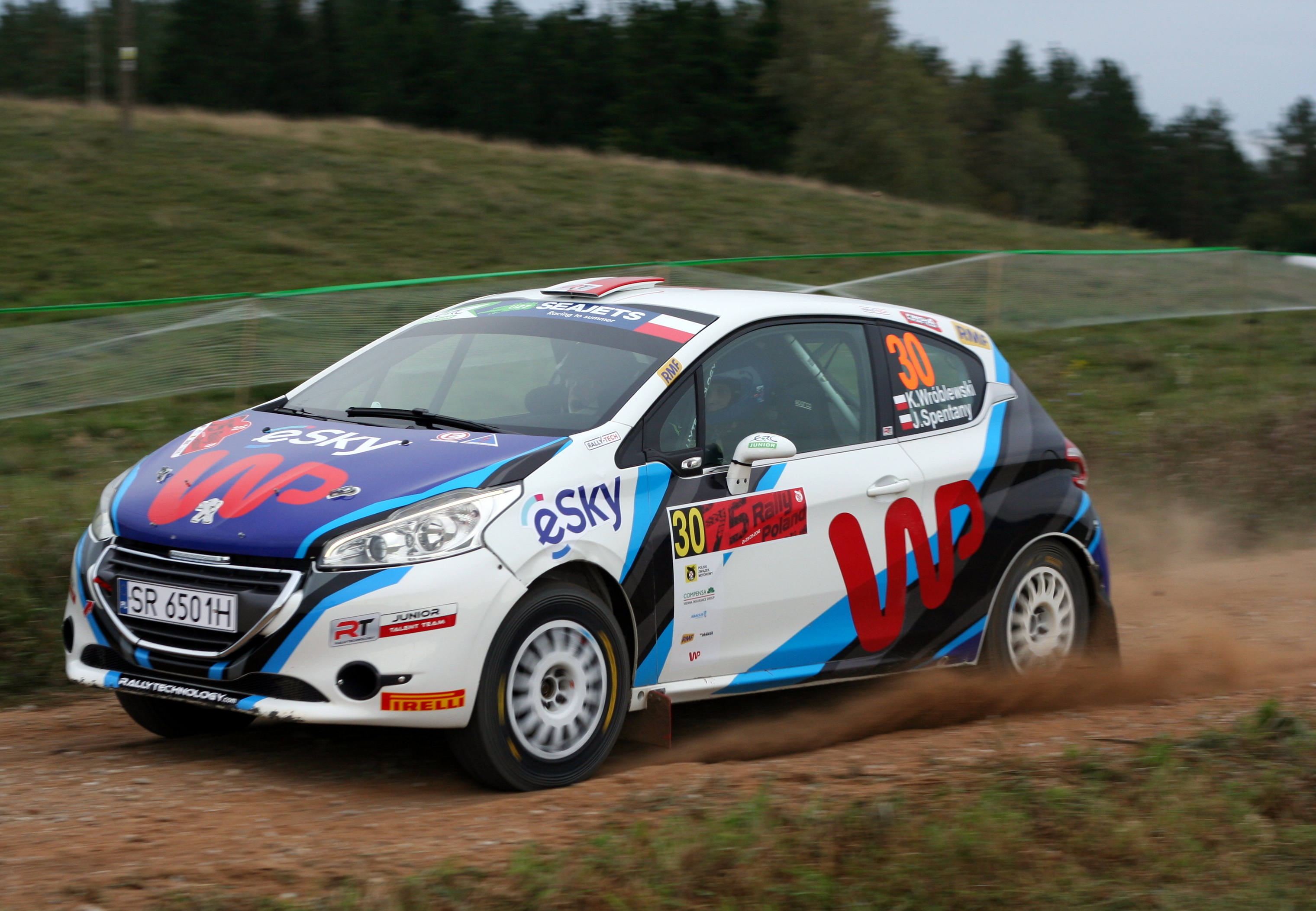 Rajd Polski - 2018 Kacper Wróblewski